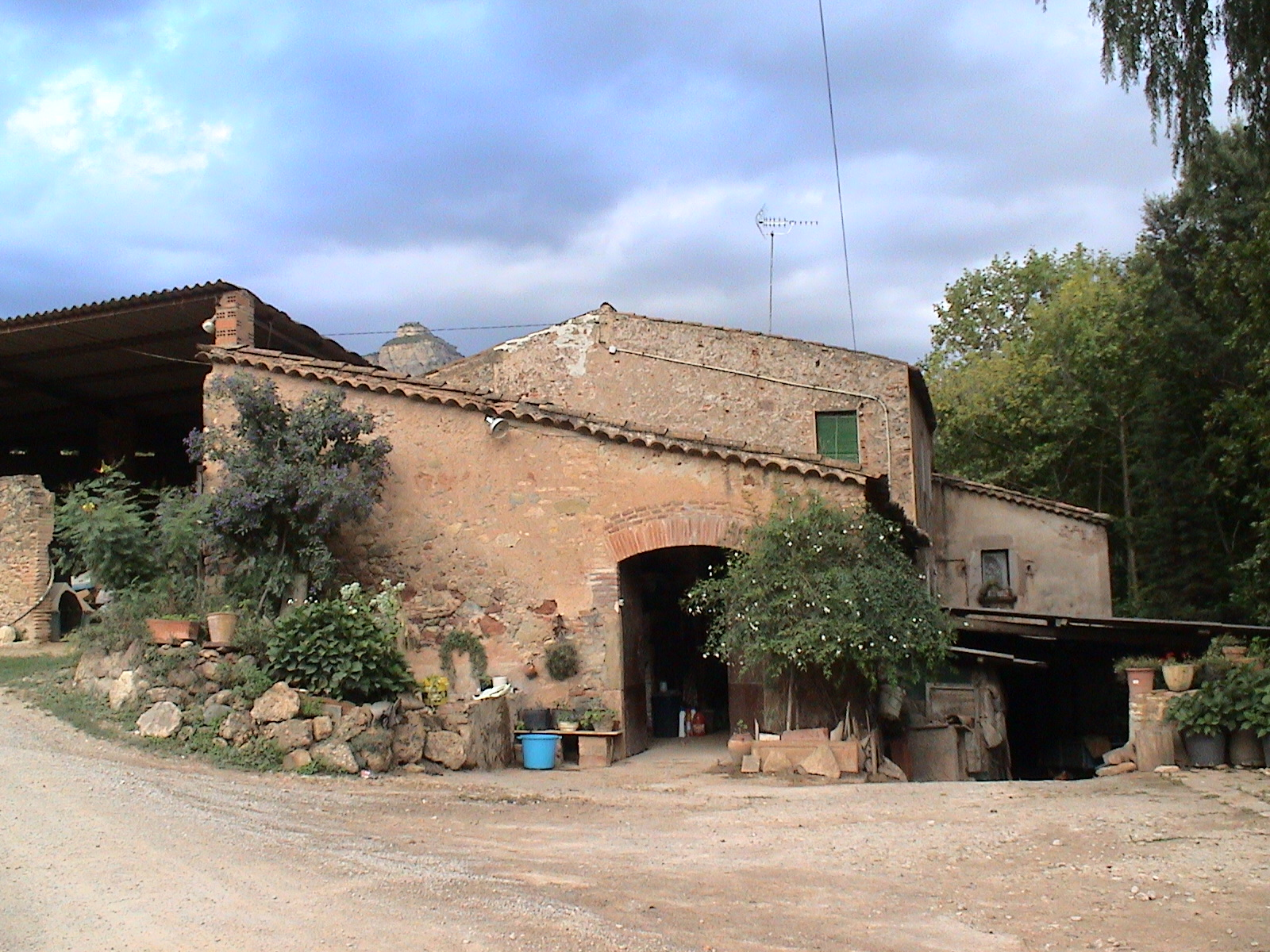 Molí de la Pineda (Riells del Fai, Bigues i Riells, Vallès Oriental)